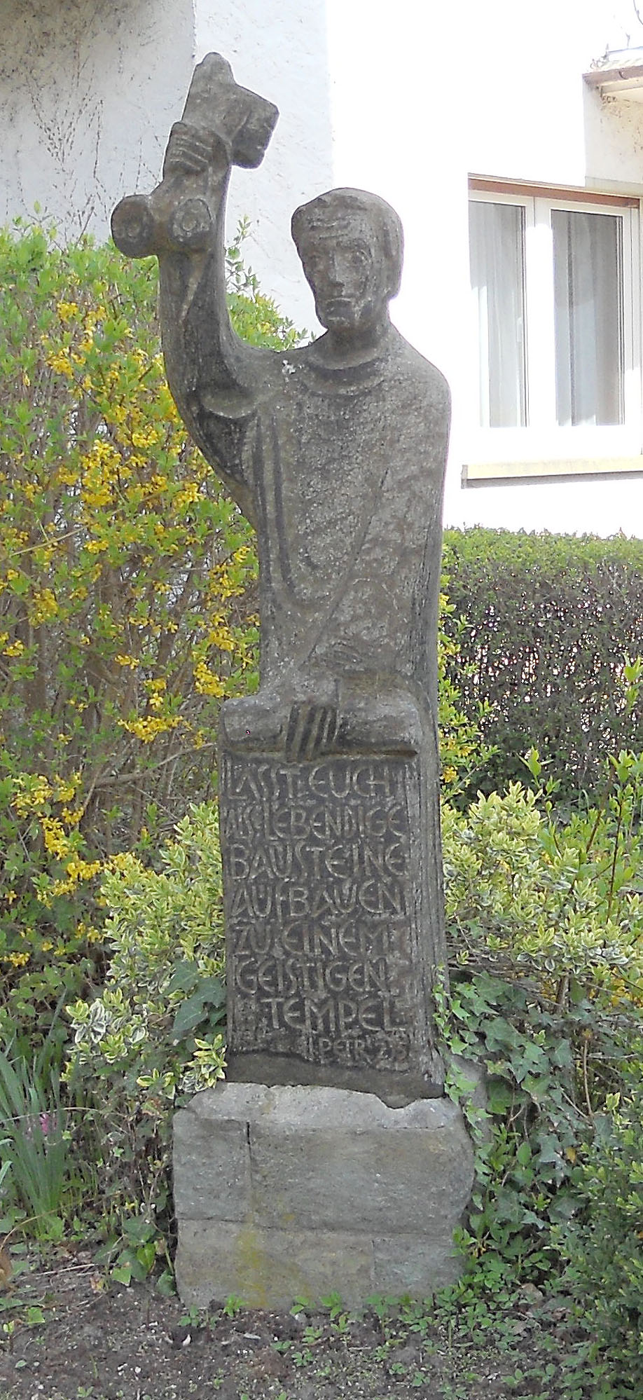 Skulptur des Petrus